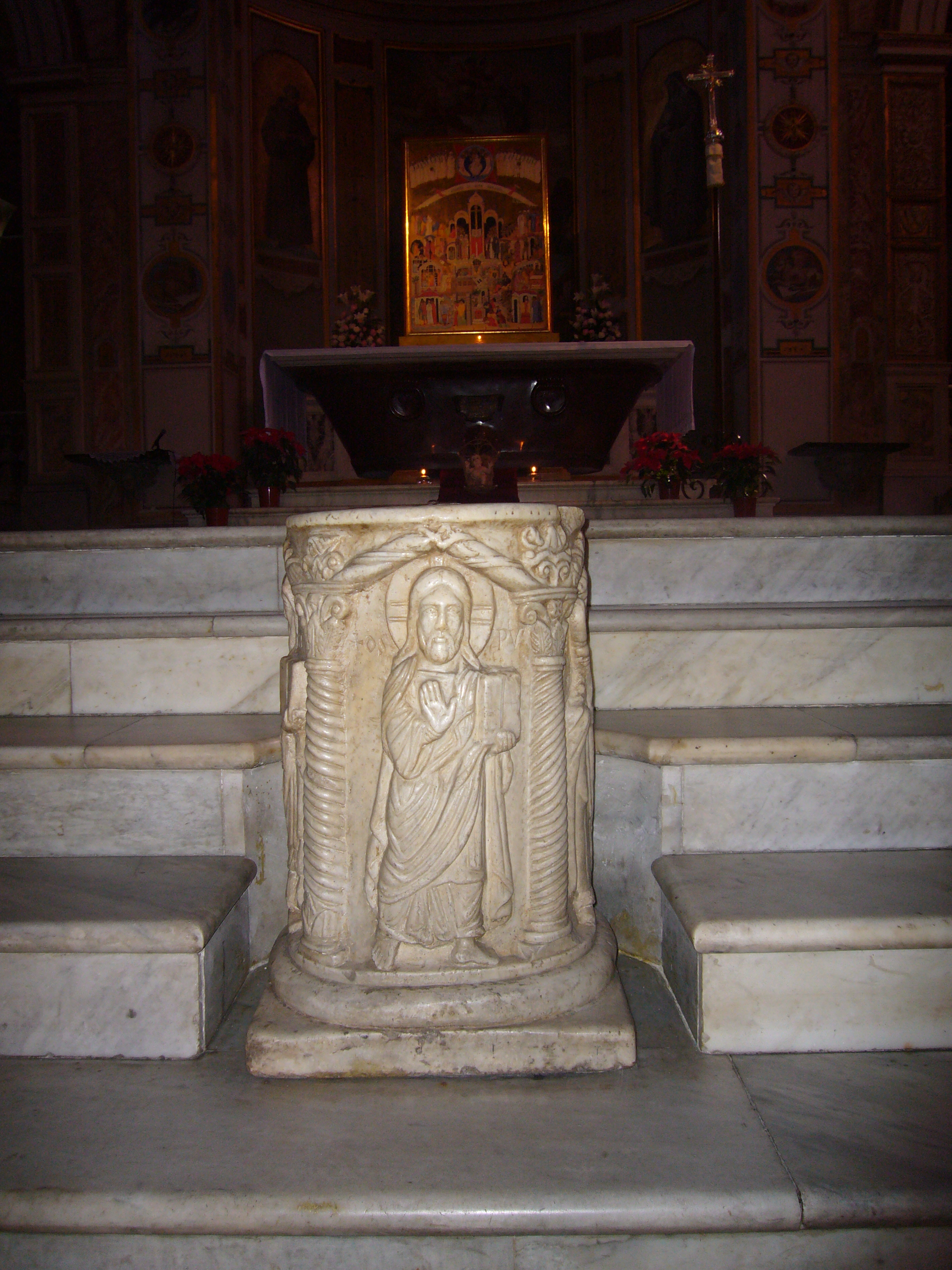 Roma, san Bartolomeo all'Isola: pozzo romanico (si ritiene che la fonte fosse quella del pozzo romano del tempio di Asclepio)